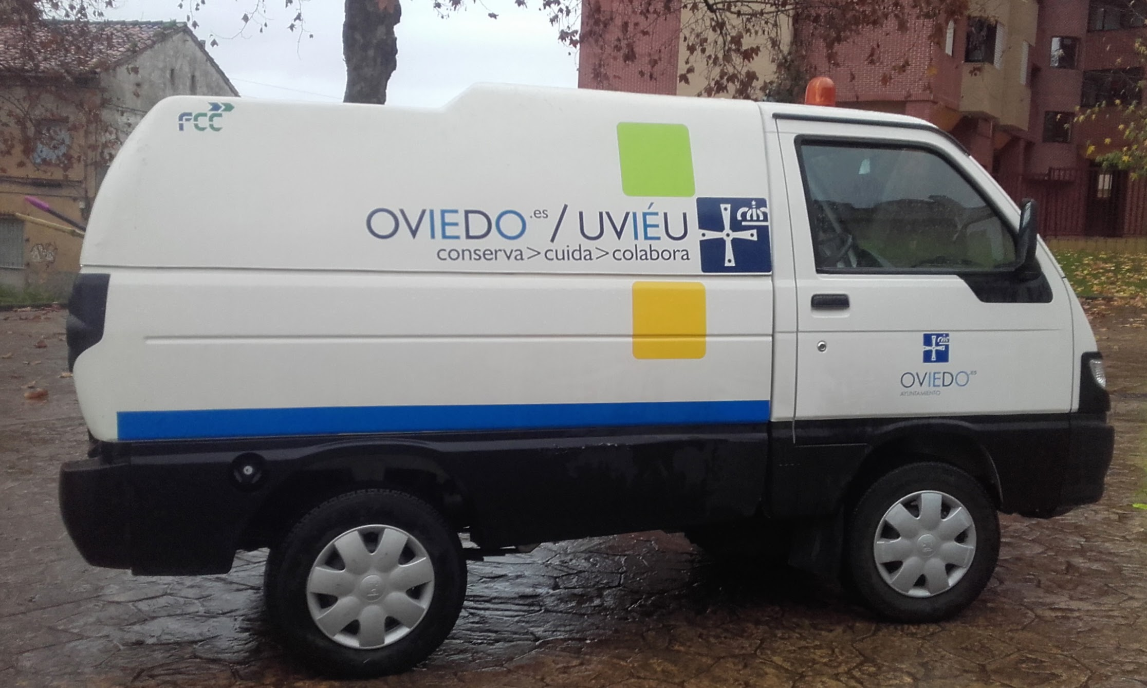 Usu del topónimu asturianu nel conceyu d'Uviéu.